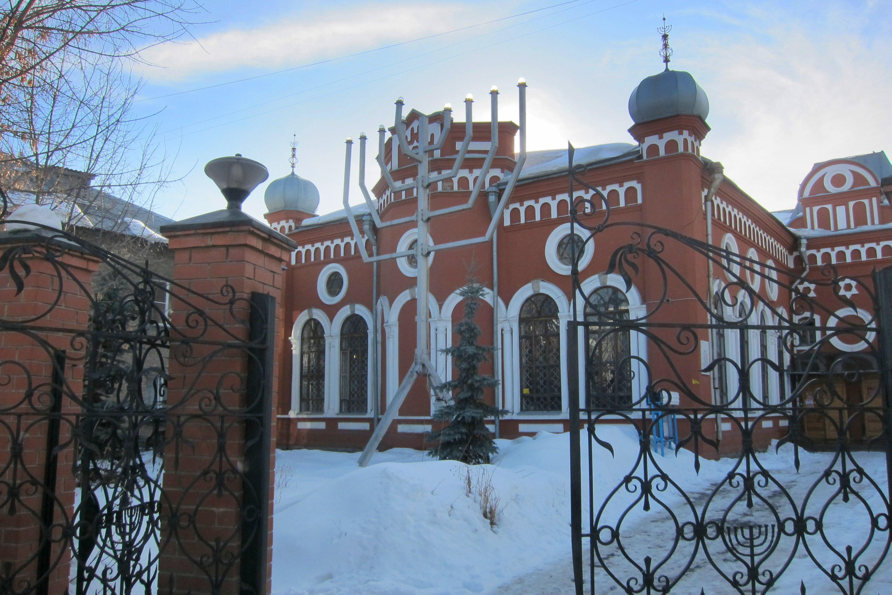 Синагога (Челябинская область, Челябинск, улица Пушкина, 6Б)